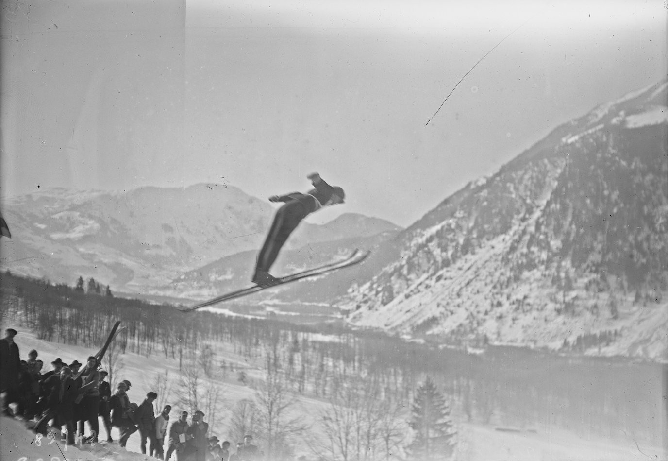 Chamonix, 4/2/24, Lind, Suédois [combiné nordique, saut à ski] : [photographie de presse] / [Agence Rol]